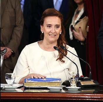 La vicepresidenta Gabriela Michetti en su toma de posecion